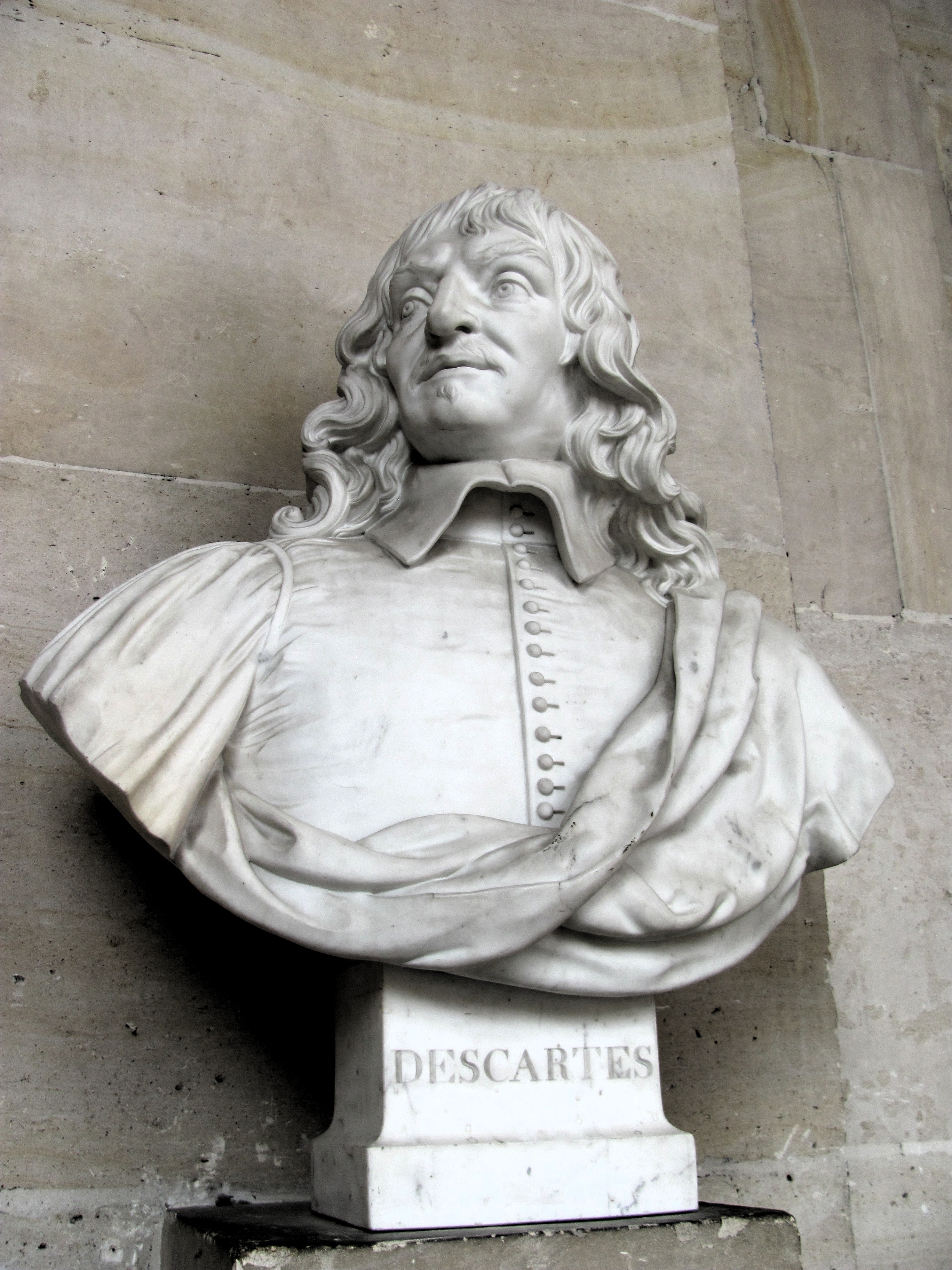 Busto de René Descartes en el Palacio de Versailles